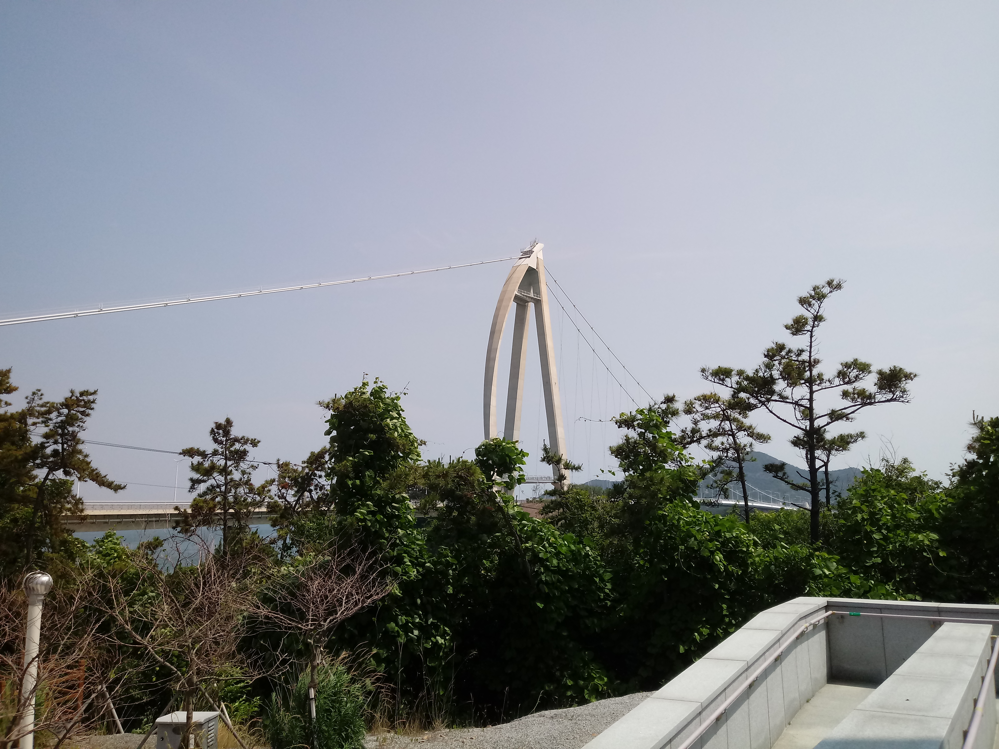 무녀도에서 본 고군산대교